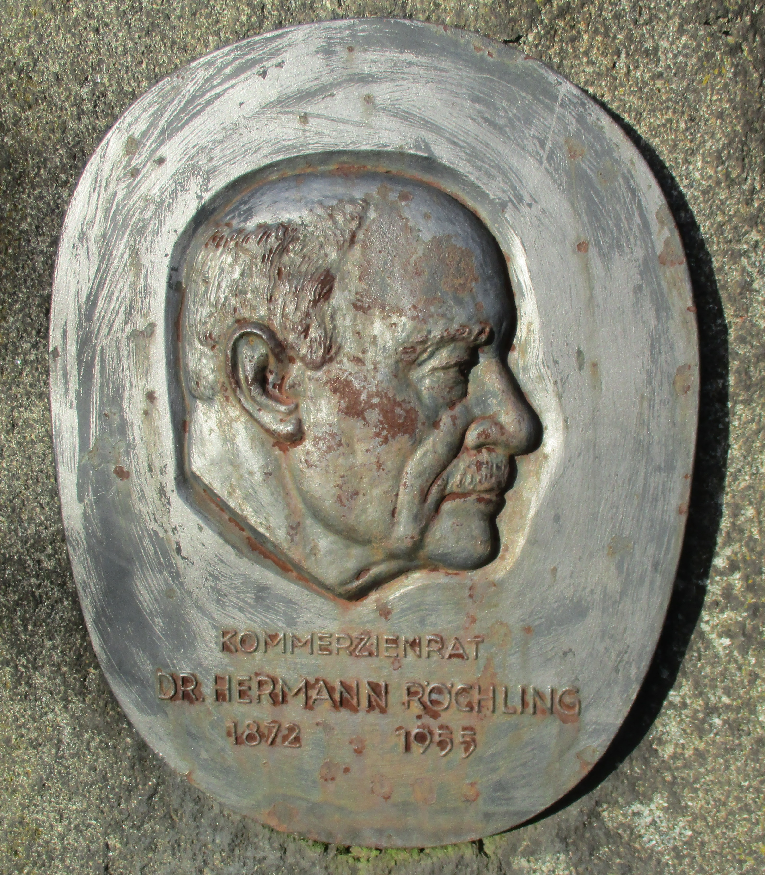 Effigie du Dr. Hermann Röchling sur un monument industriel à Völklingen